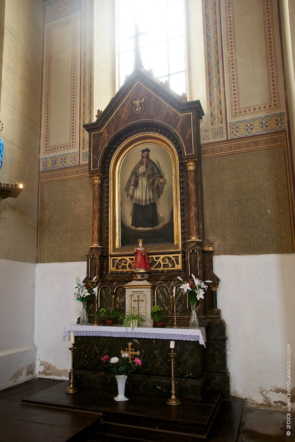 Jeden z bočních oltářů